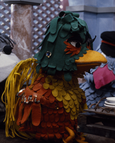 Isadora Paradijsvogel uit de Fabeltjeskrant